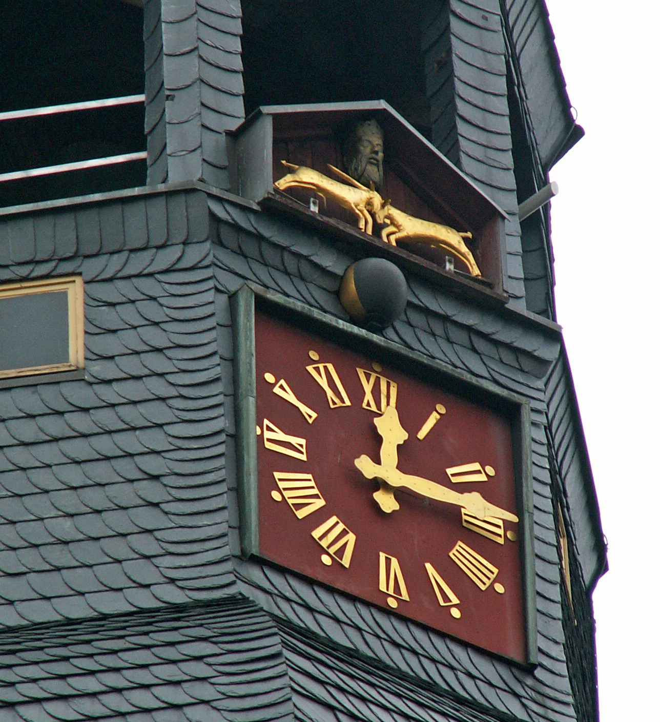 die Rathausuhr mit den Ziegenböcken